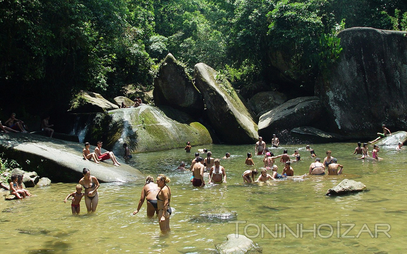 Poço das Antas de Mongaguá, por Toninho Izar